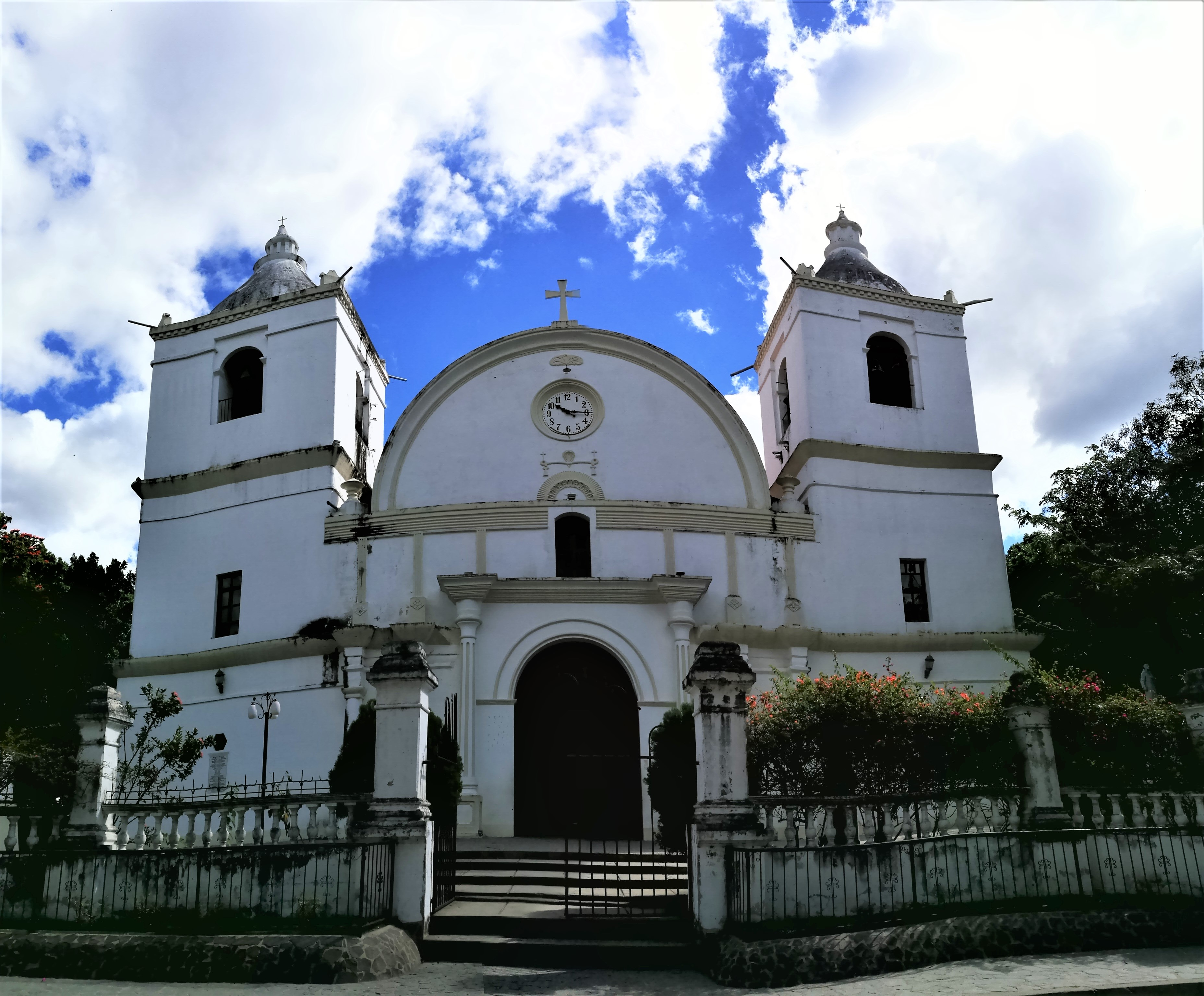 Templo parroquial Nuestra Señora de La Asunción de María, Ocotal, Nueva Segovia.